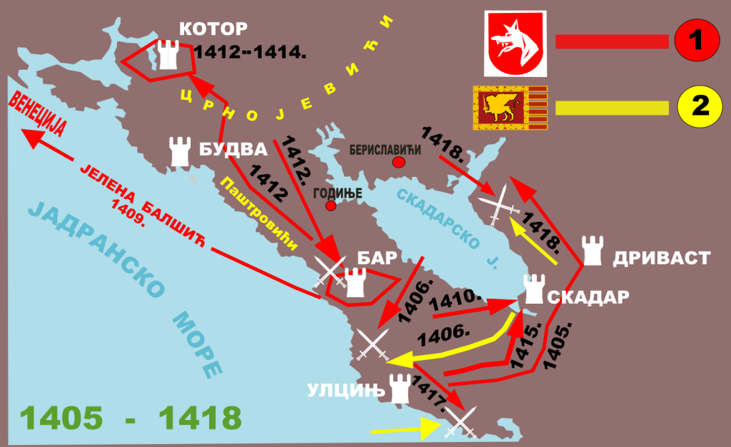 1. Покрети снага Балша III у периоду Првог скадарског рата и касније, до 1418. године; 2. Млетачке снаге.